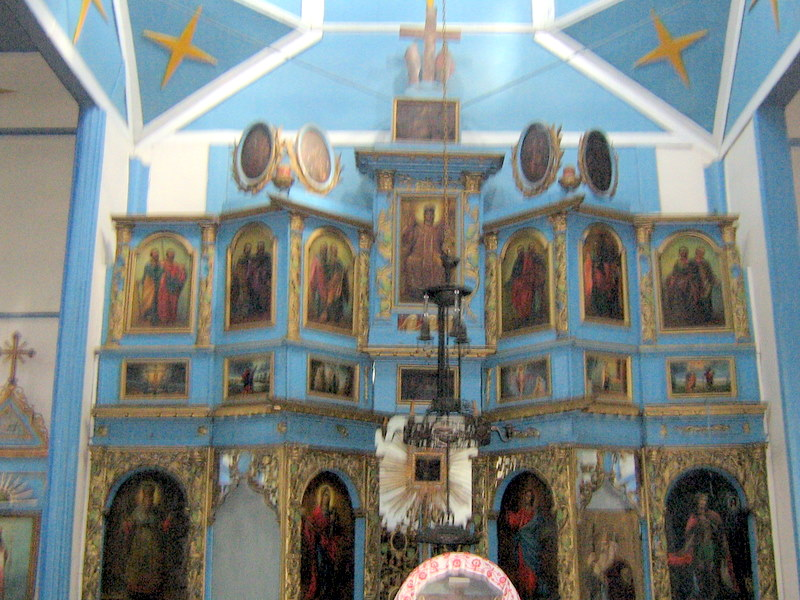 Церква св. Георгія із Андрушівки. Іконостас